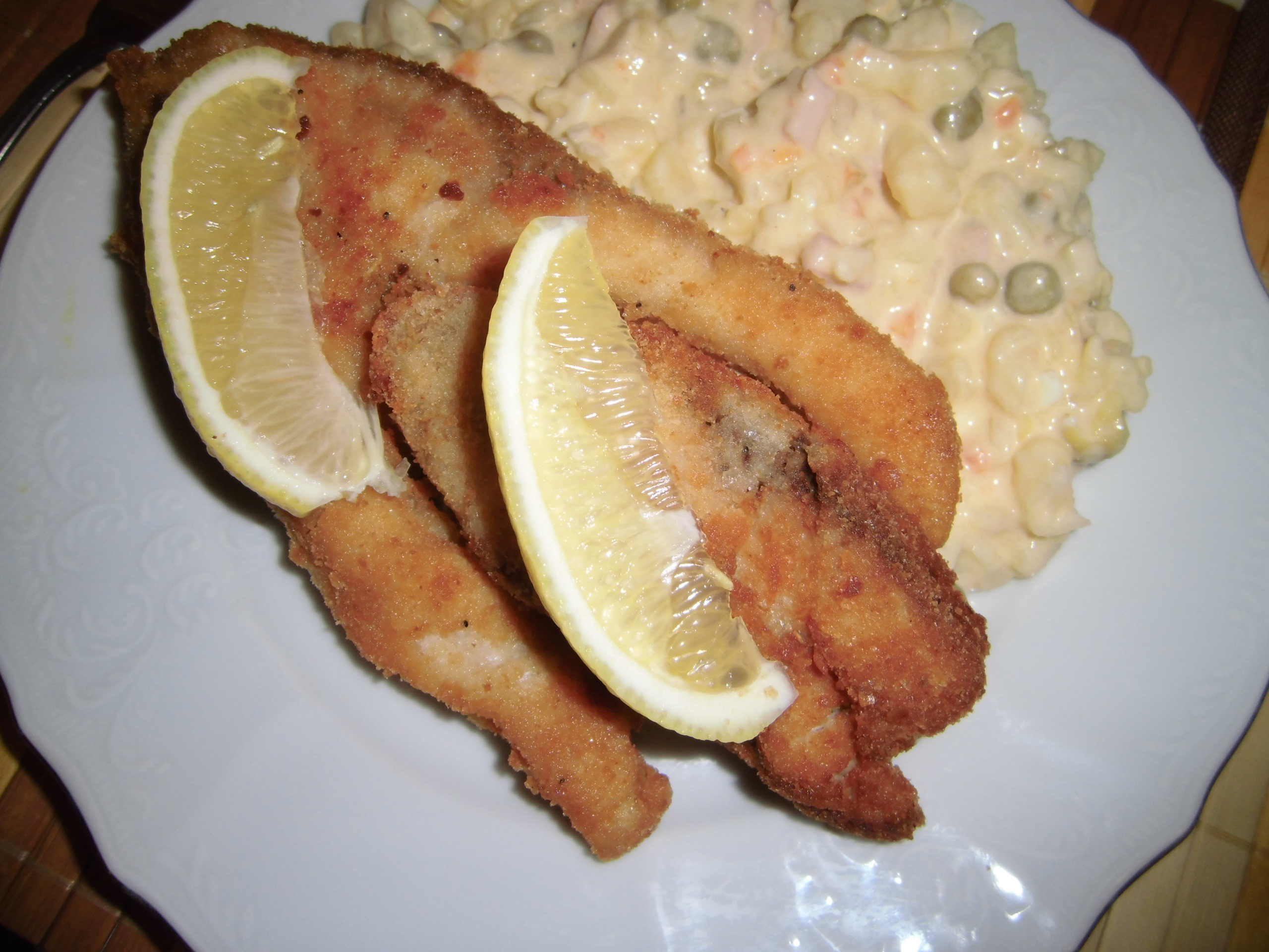 Vánoční jídlo